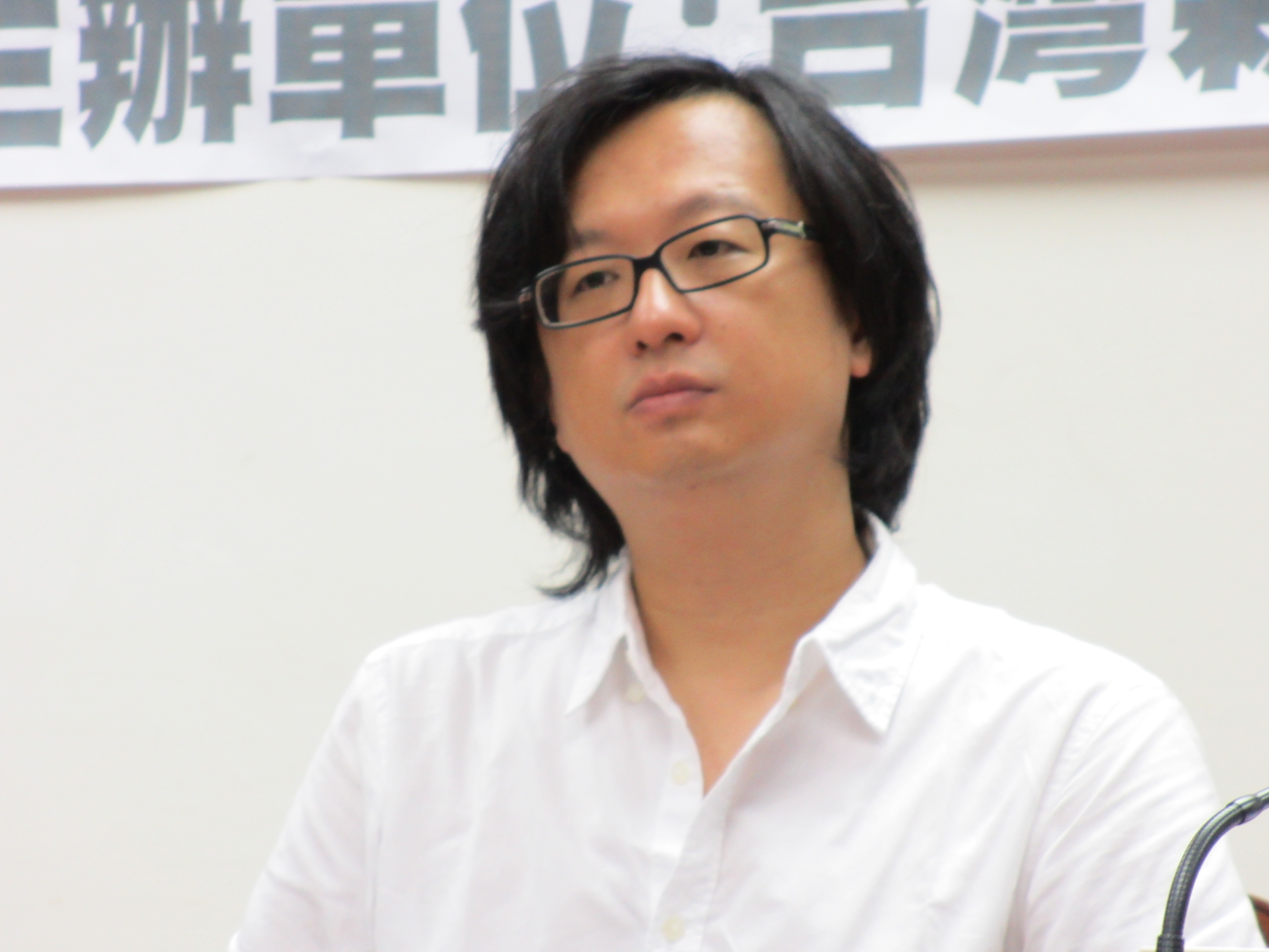 中文（台灣）: 台灣作家張鐵志